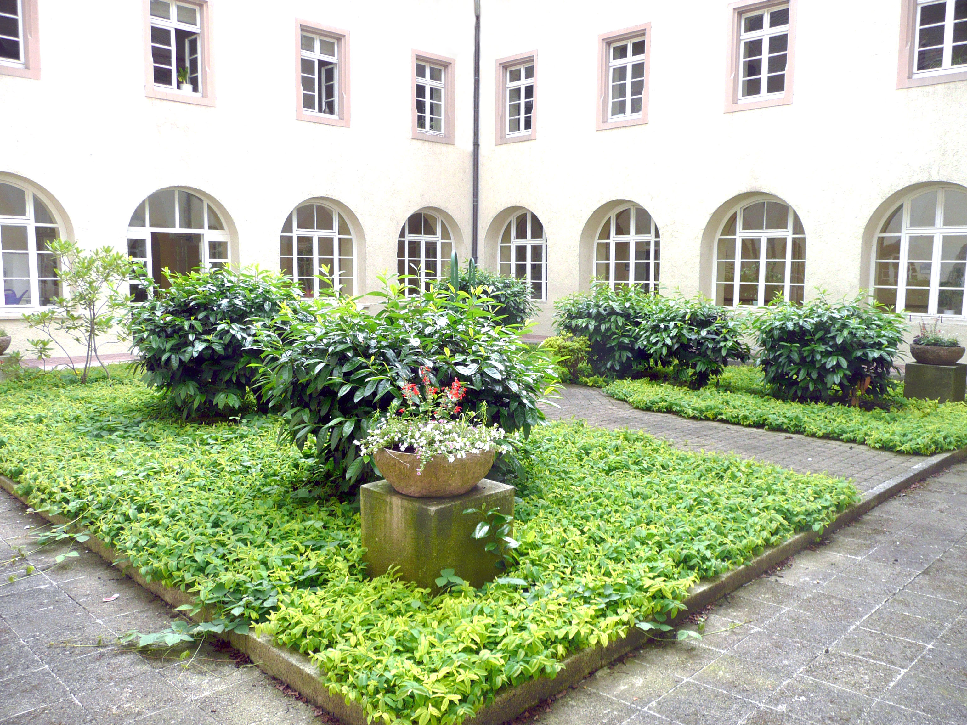 Blick vom Kreuzgang in den Innenhof